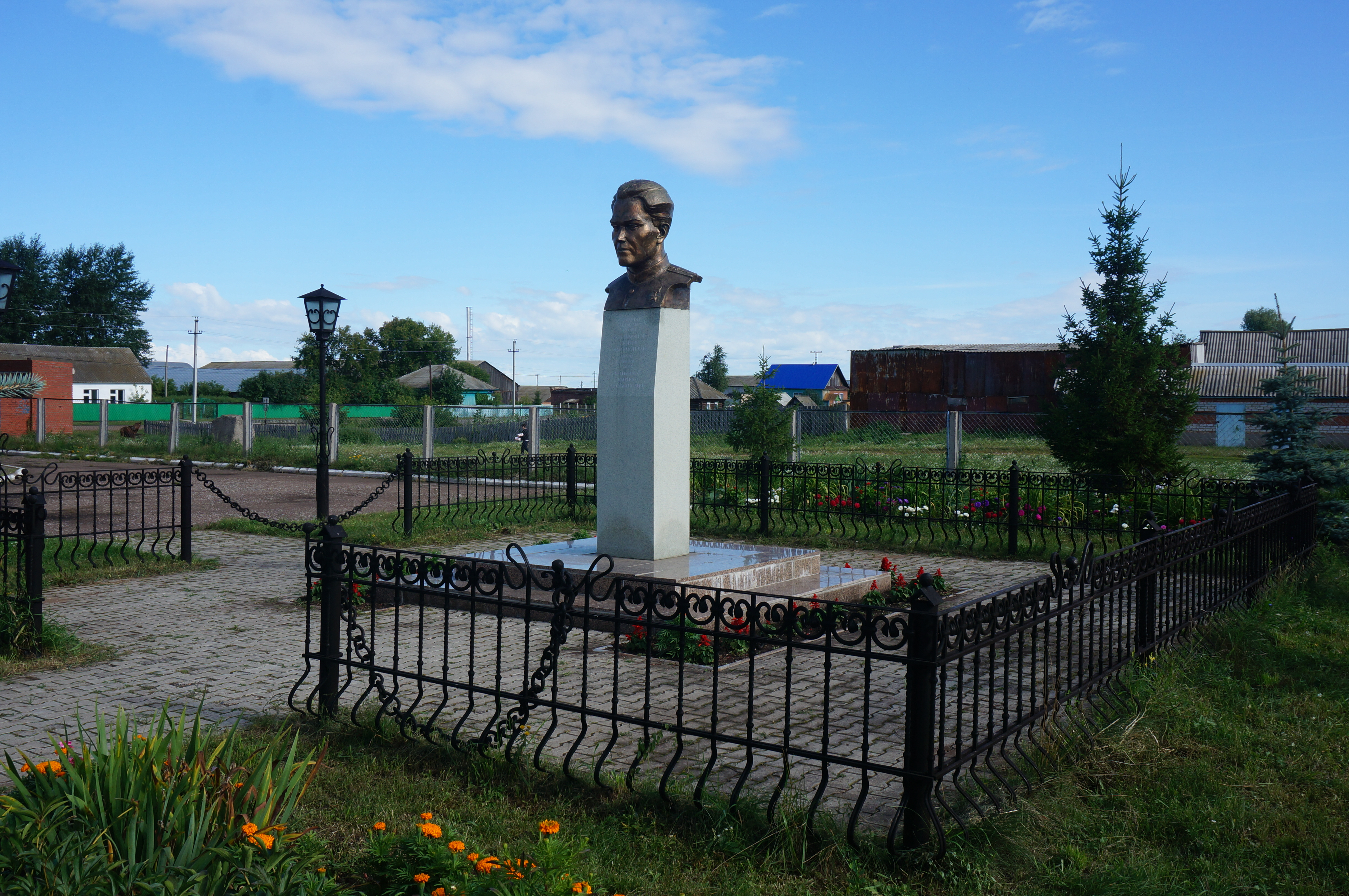 Памятник Сулейманову Шарифу Сулеймановичу д. Новый Каинлык Краснокамского района БашкортостанаБашҡортса: Башҡортостандың Краснокама районы Яңы Ҡайынлыҡ ауылында Сөләймәнов Шәриф һәйкәле. Ансар Нуртдинов архивынан.